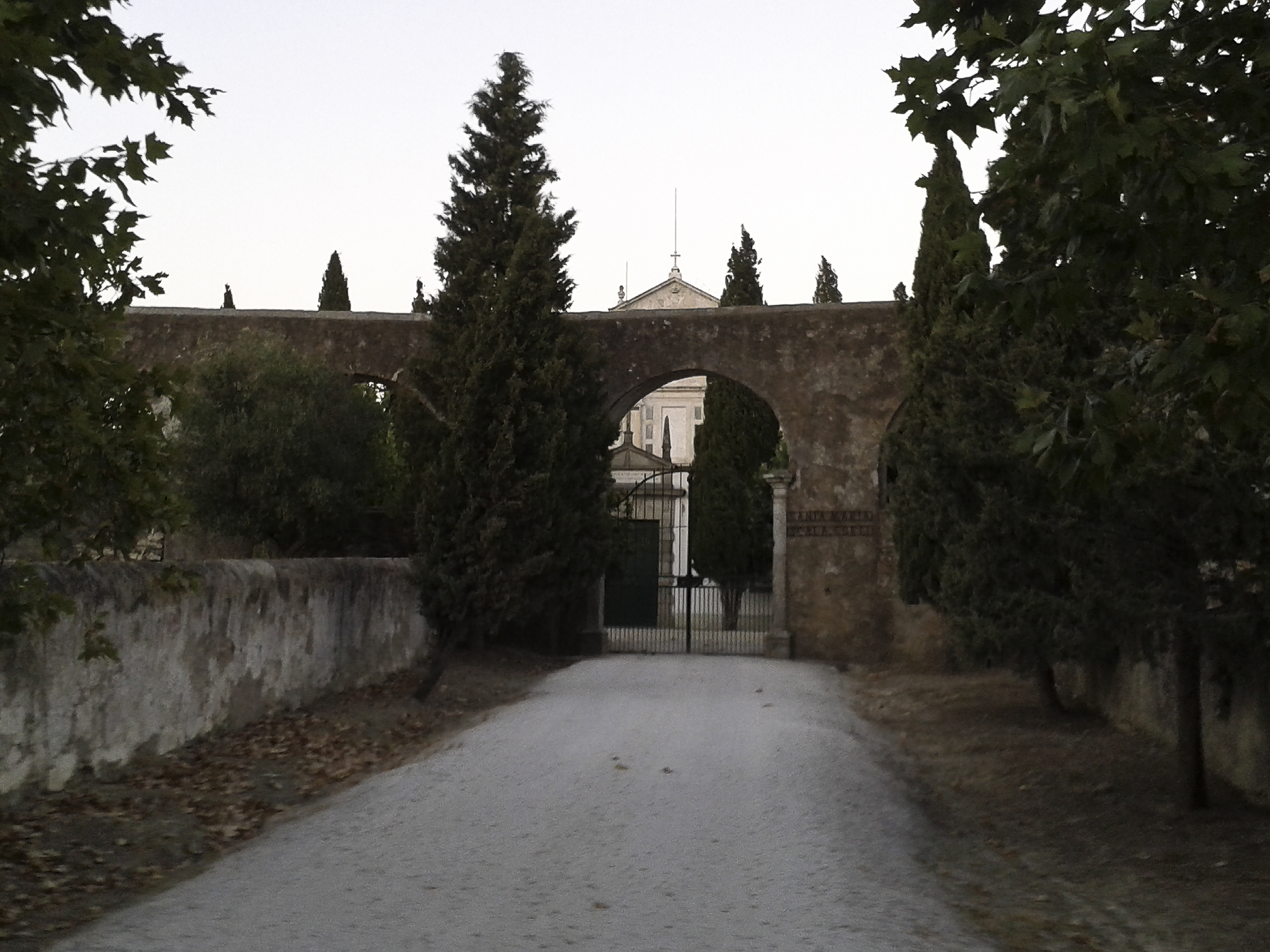 Aqueduto da Água da Prata à frente do portão de entrada do Convento dos Capuchos